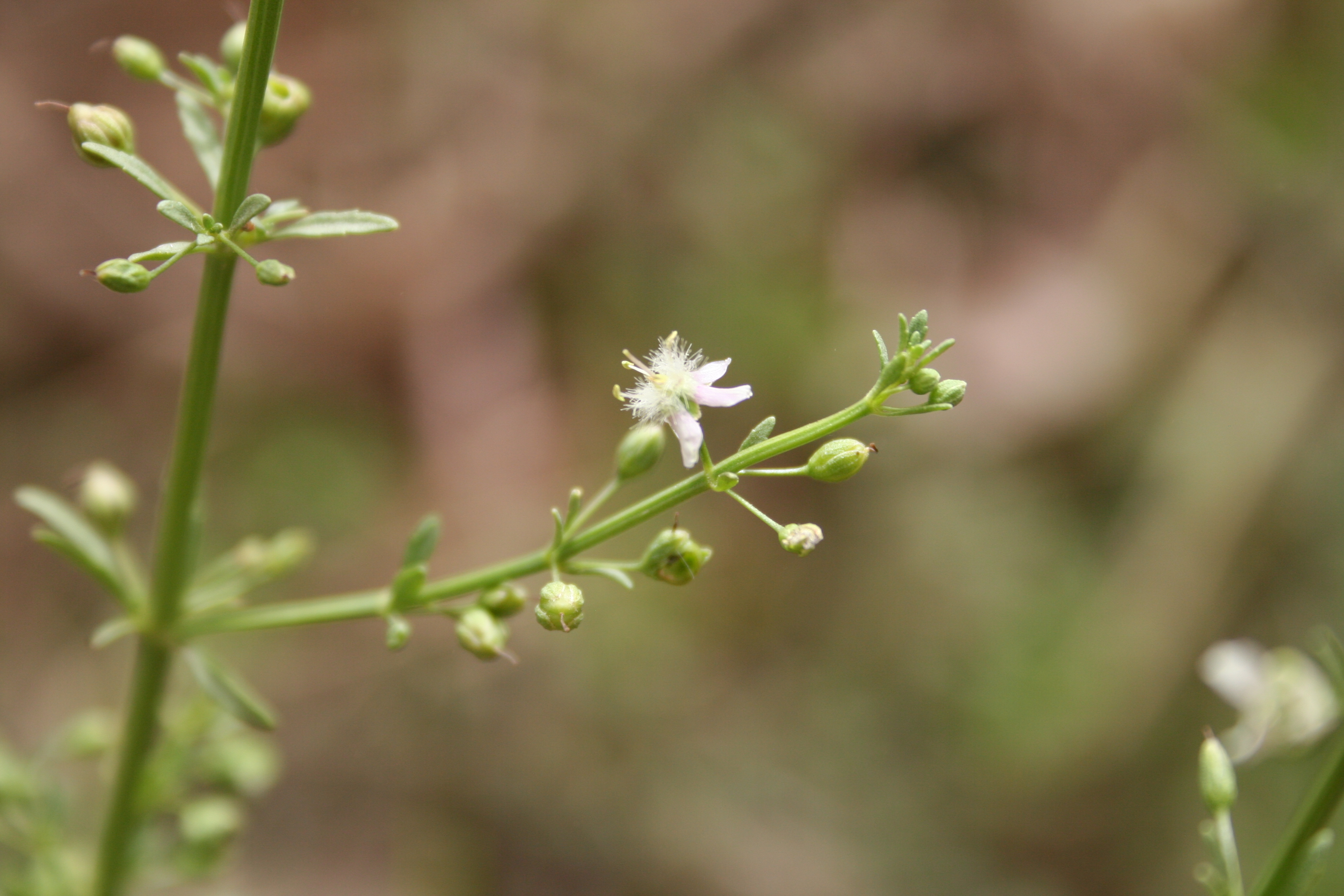 Scoparia dulcis, near F.Cl. de Patako, Senegal